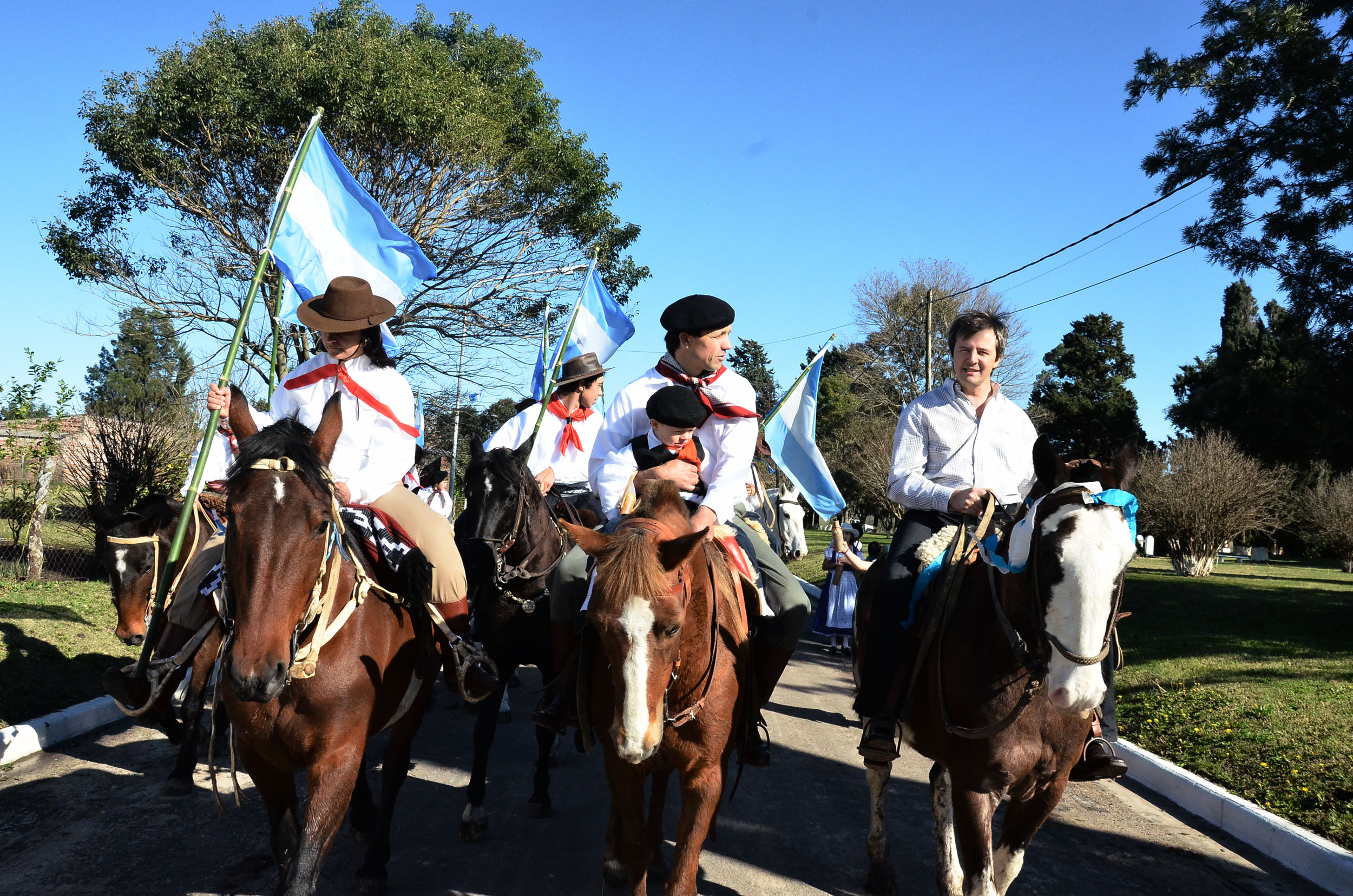 El Ministro de Gobierno y Justicia de Entre Ríos, Adán Bahl, participó de los festejos por el 125° aniversario de Aldea Santa María, una comunidad de descendientes de alemanes del Volga ubicada al noreste de la ciudad de Paraná, de la que la separan aproximadamente 70 kilómetros de distancia.